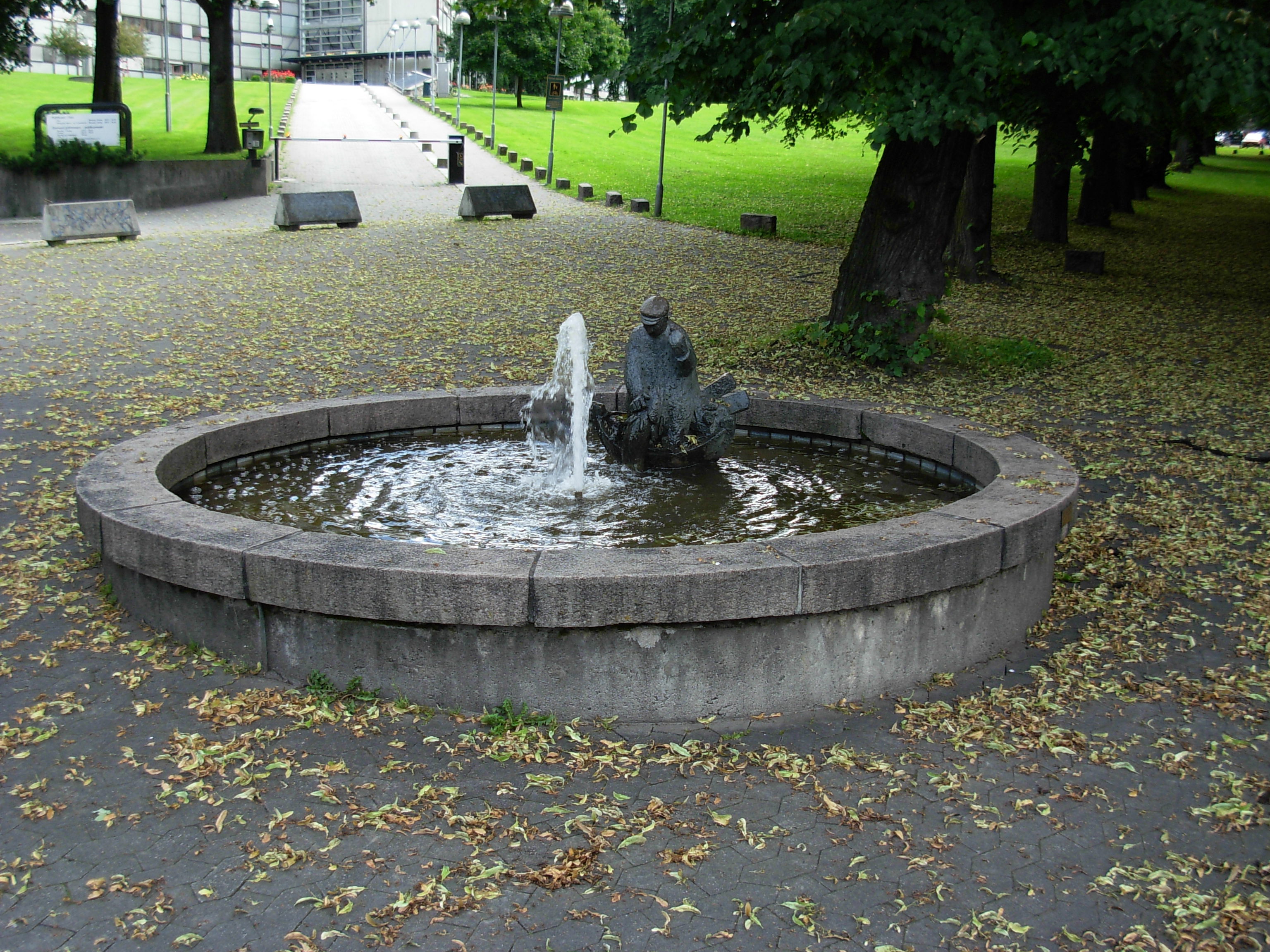 Fontene med skulptur, Grønlands park, Oslo